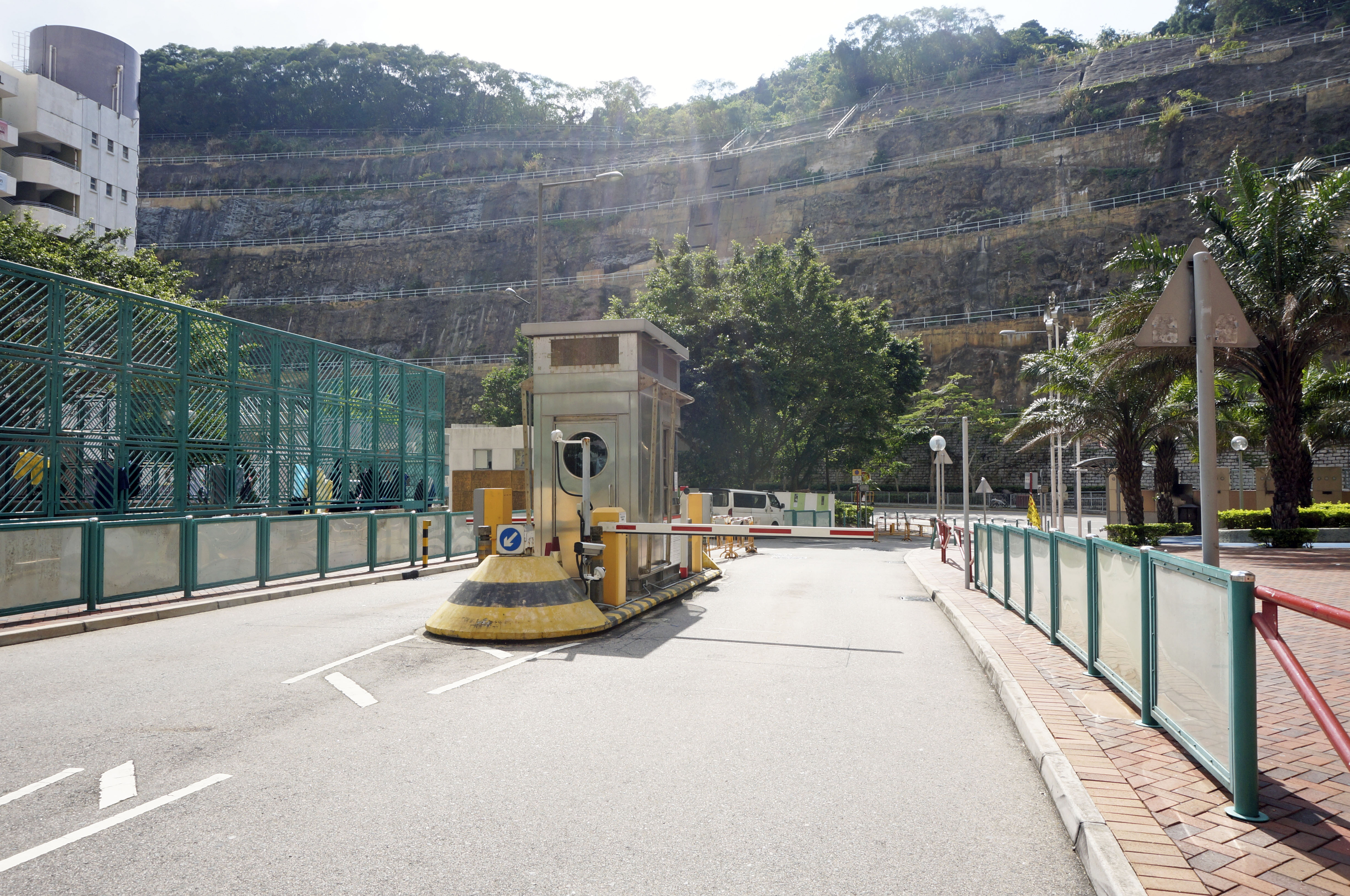 調景嶺勤學里東段部分